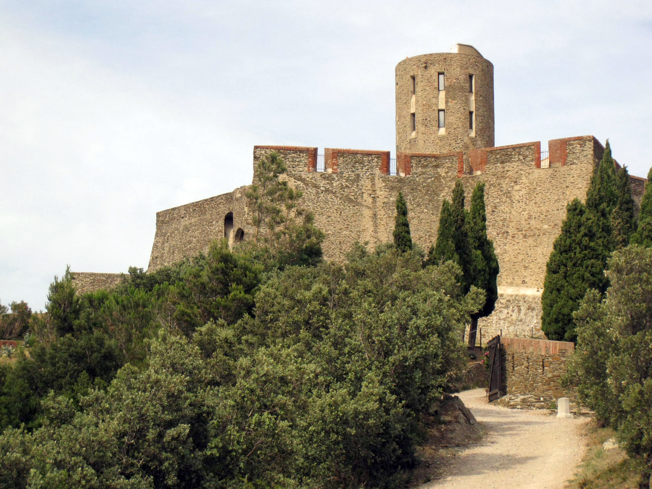 Fort de Sant Elm (Cotlliure)